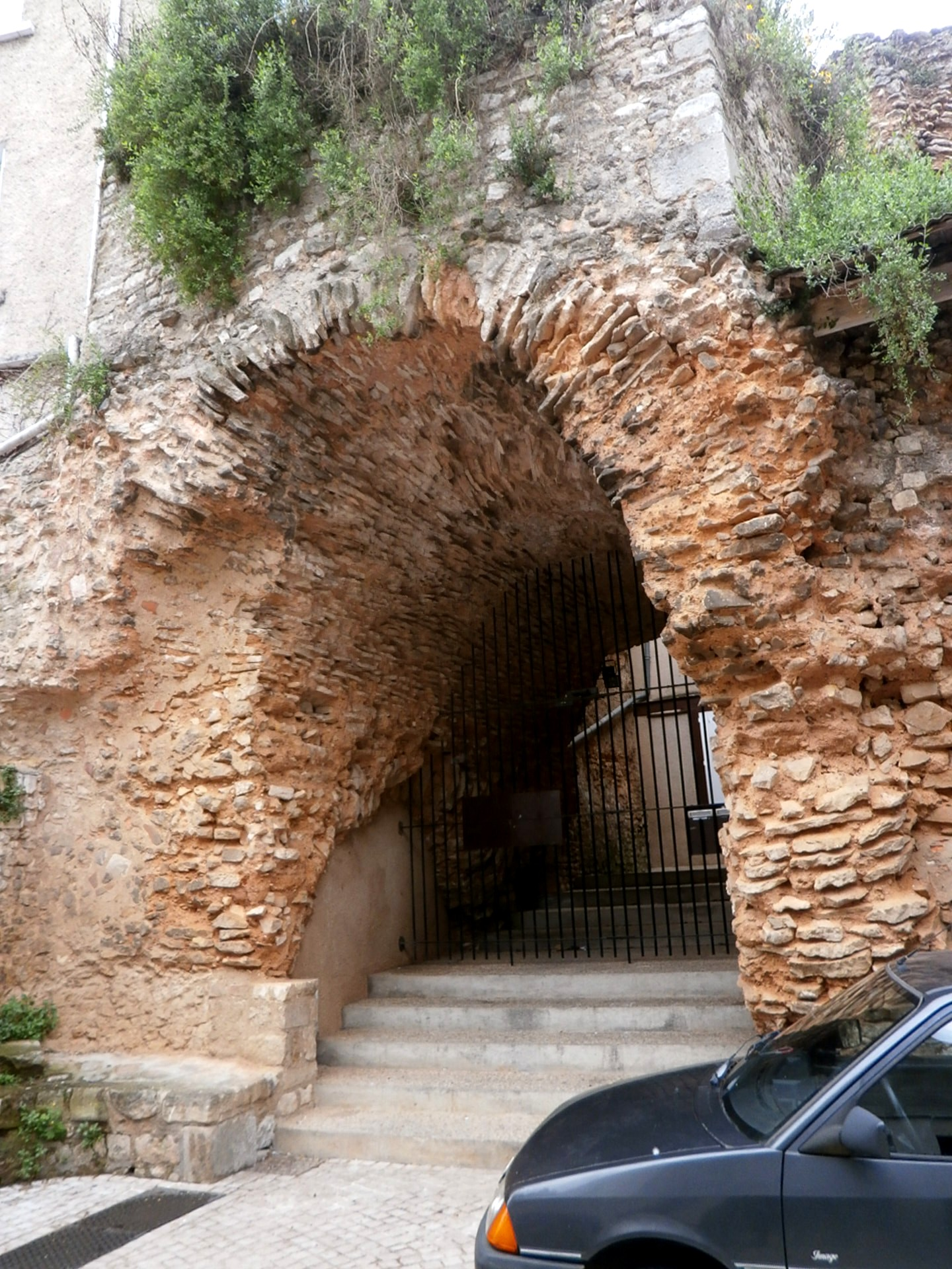 Amphithéâtre romain de Poitiers (rue Bourcani)